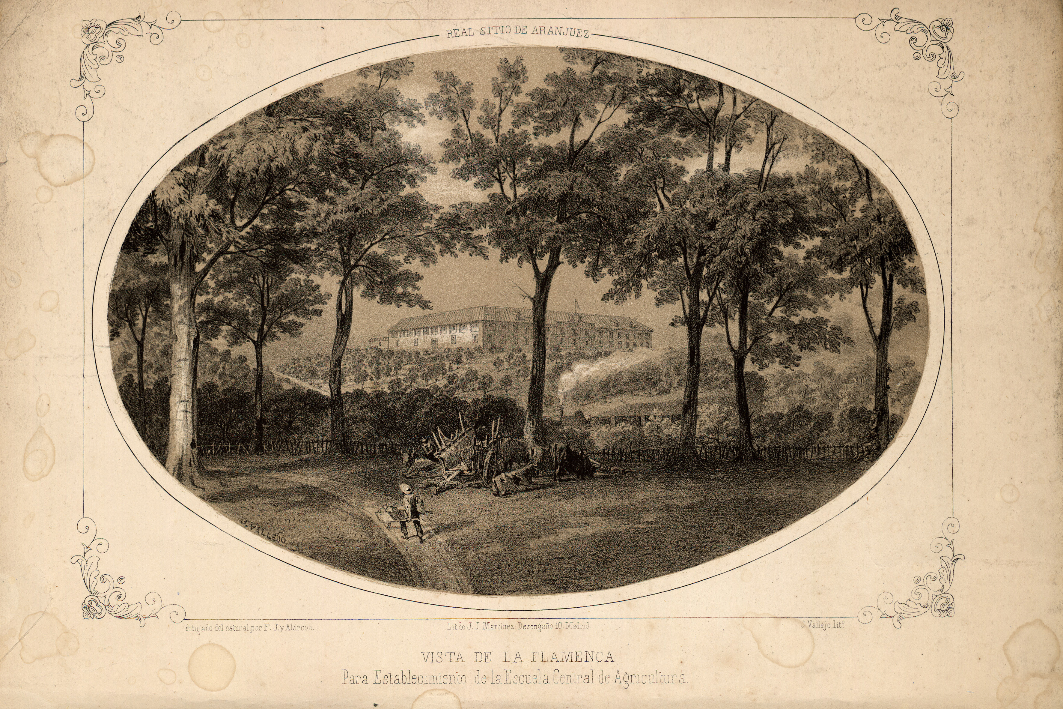 Vista de la Flamenca para establecimiento de la Escuela Central de Agricultura. Dibujado del natural por F. J. y Alarcón. J. Vallejo lit.°.